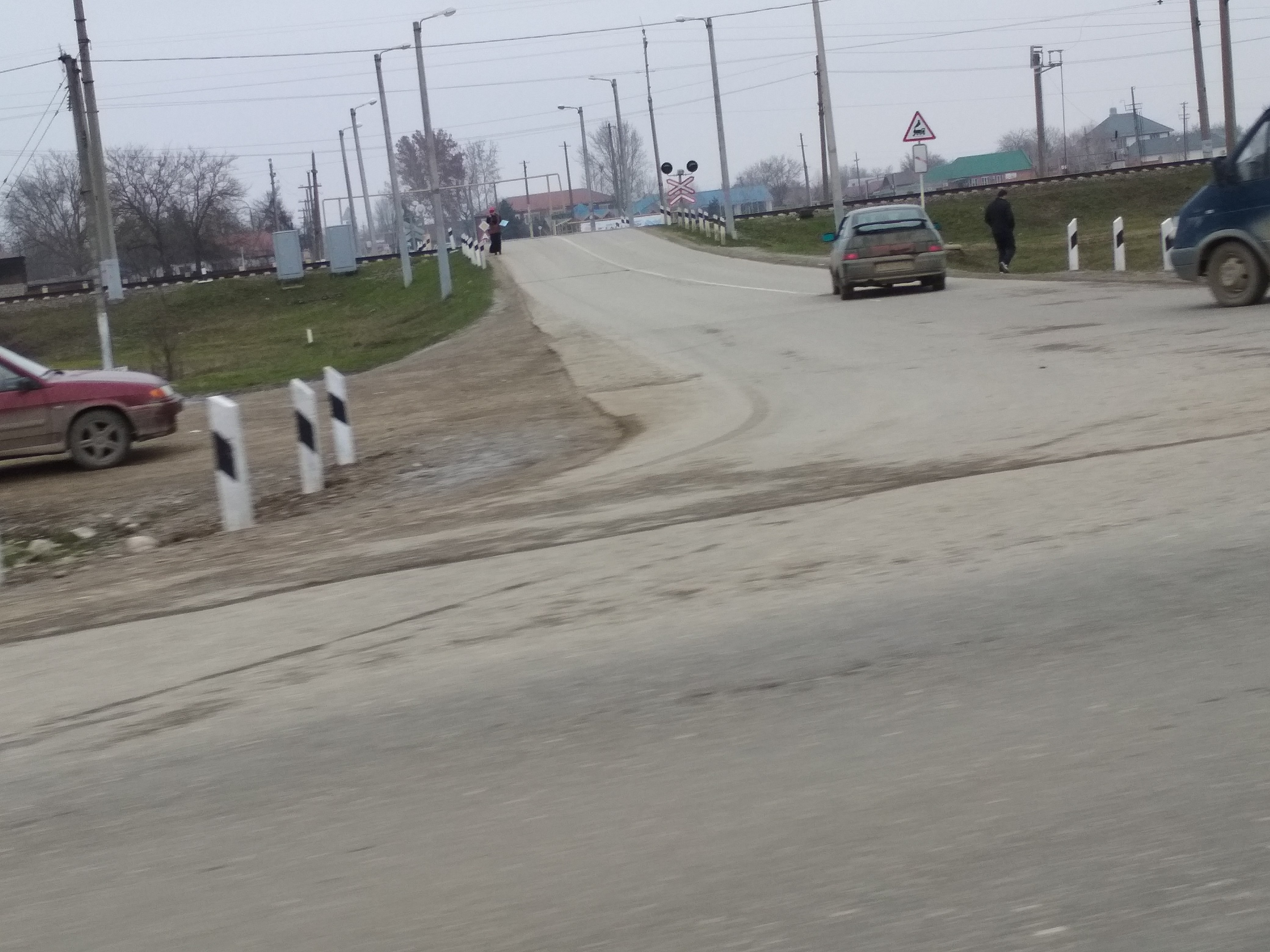 Нохчийн: Ж/д переезд в Новотерском